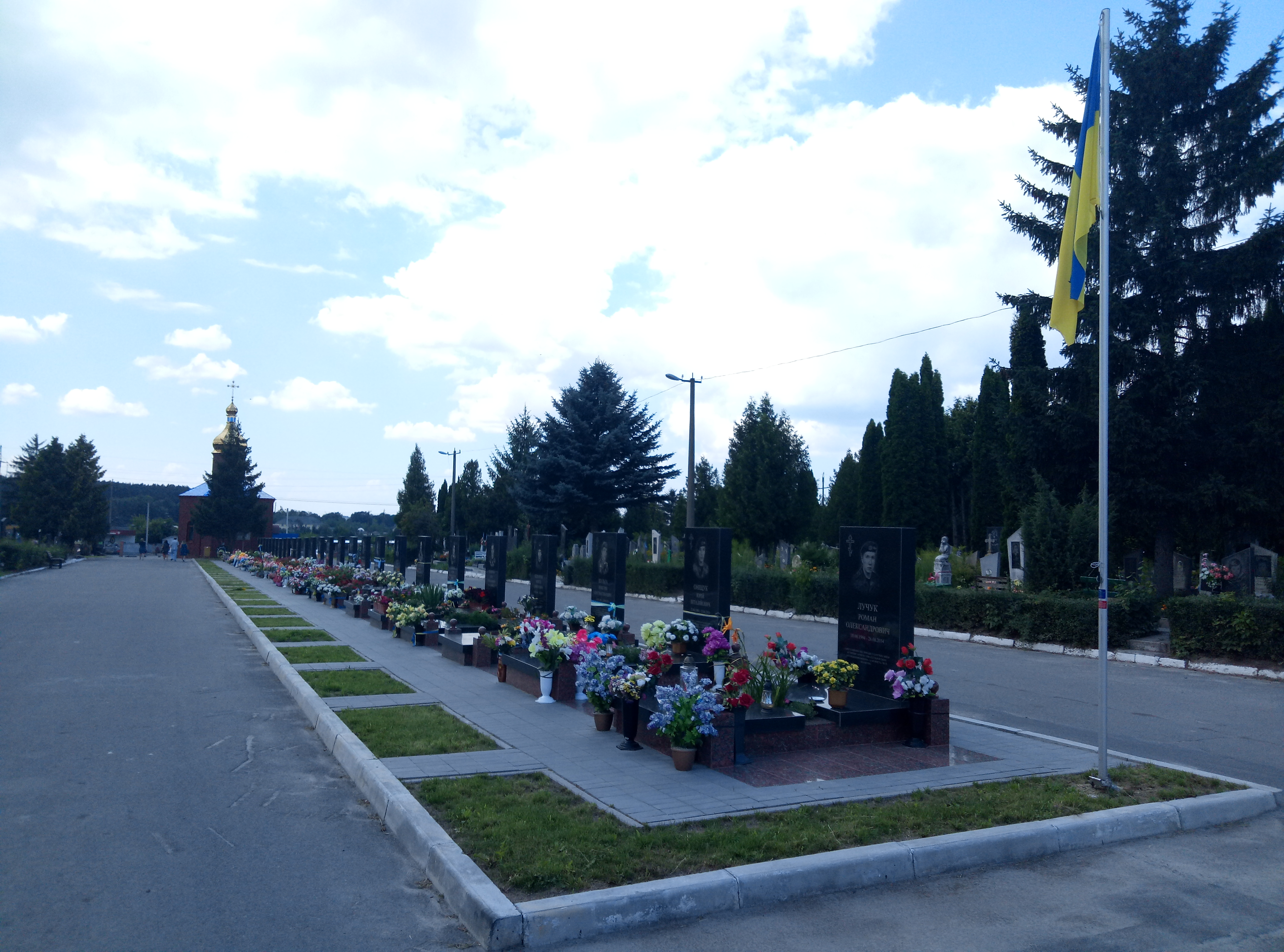 Алея Героїв АТО на міському кладовищі міста Луцька, загальний вигляд